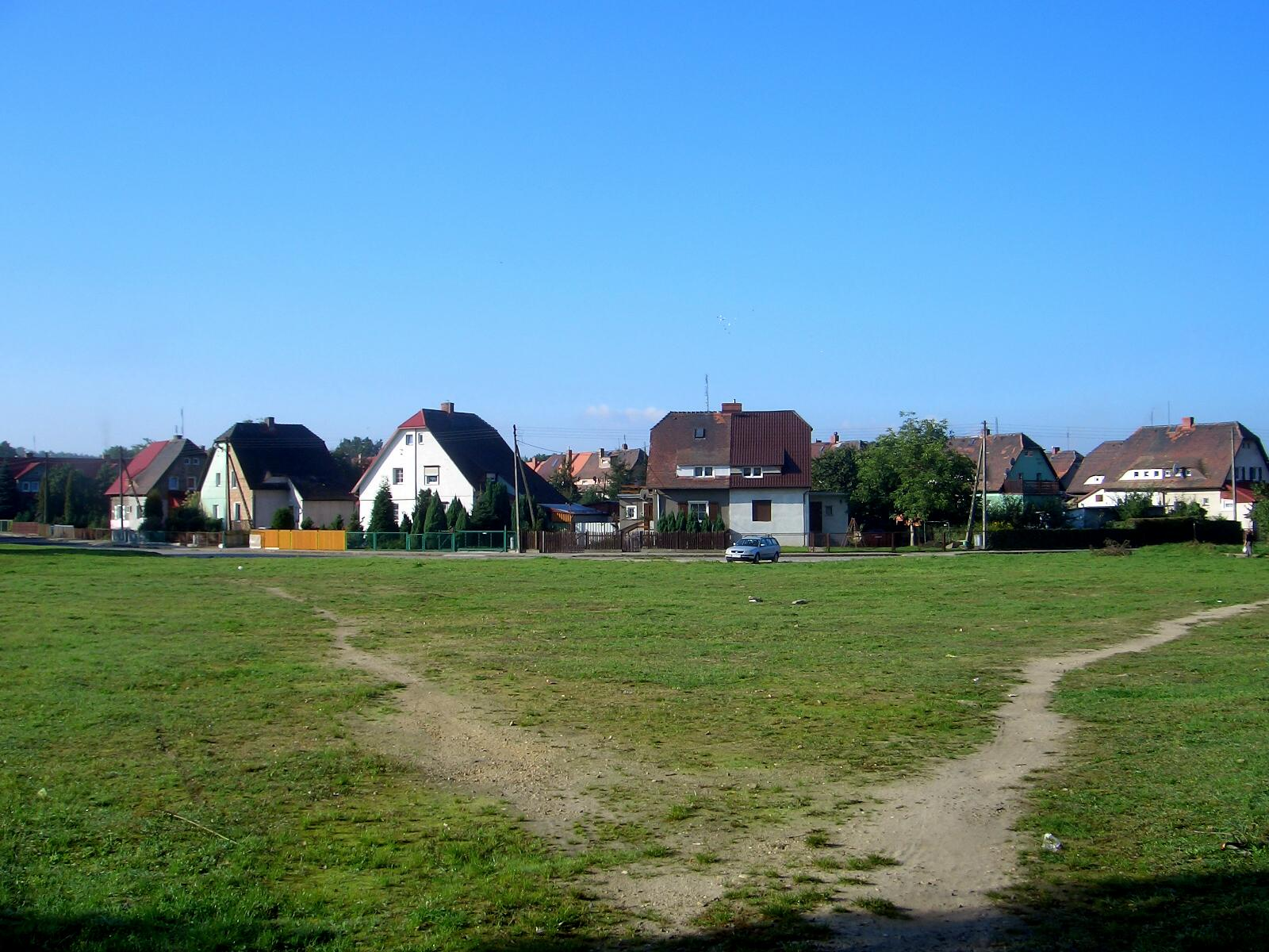 Häuser der früheren Lehde - Bergarbeitersiedlung